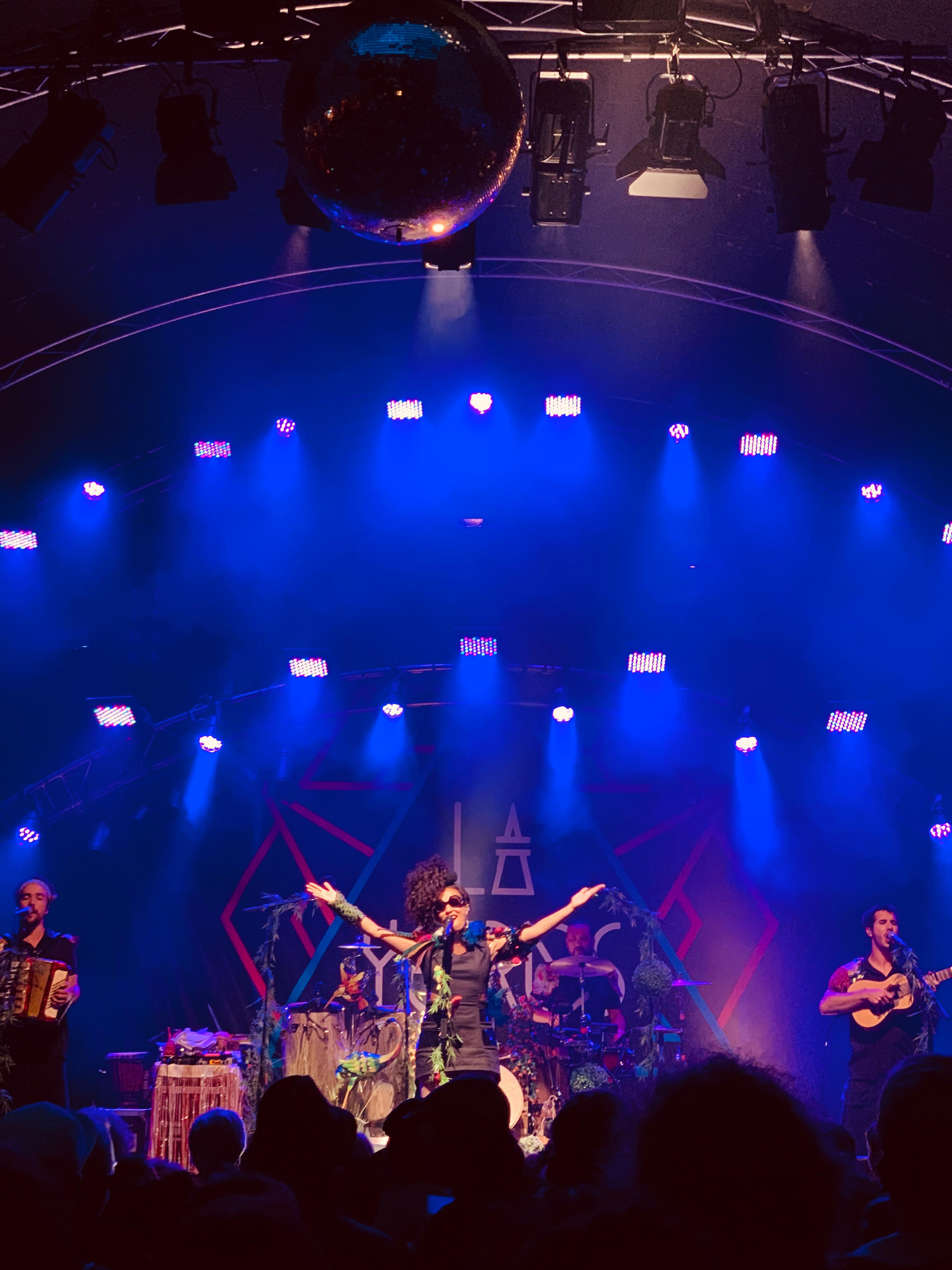 La Yegros en San Galo, Suiza